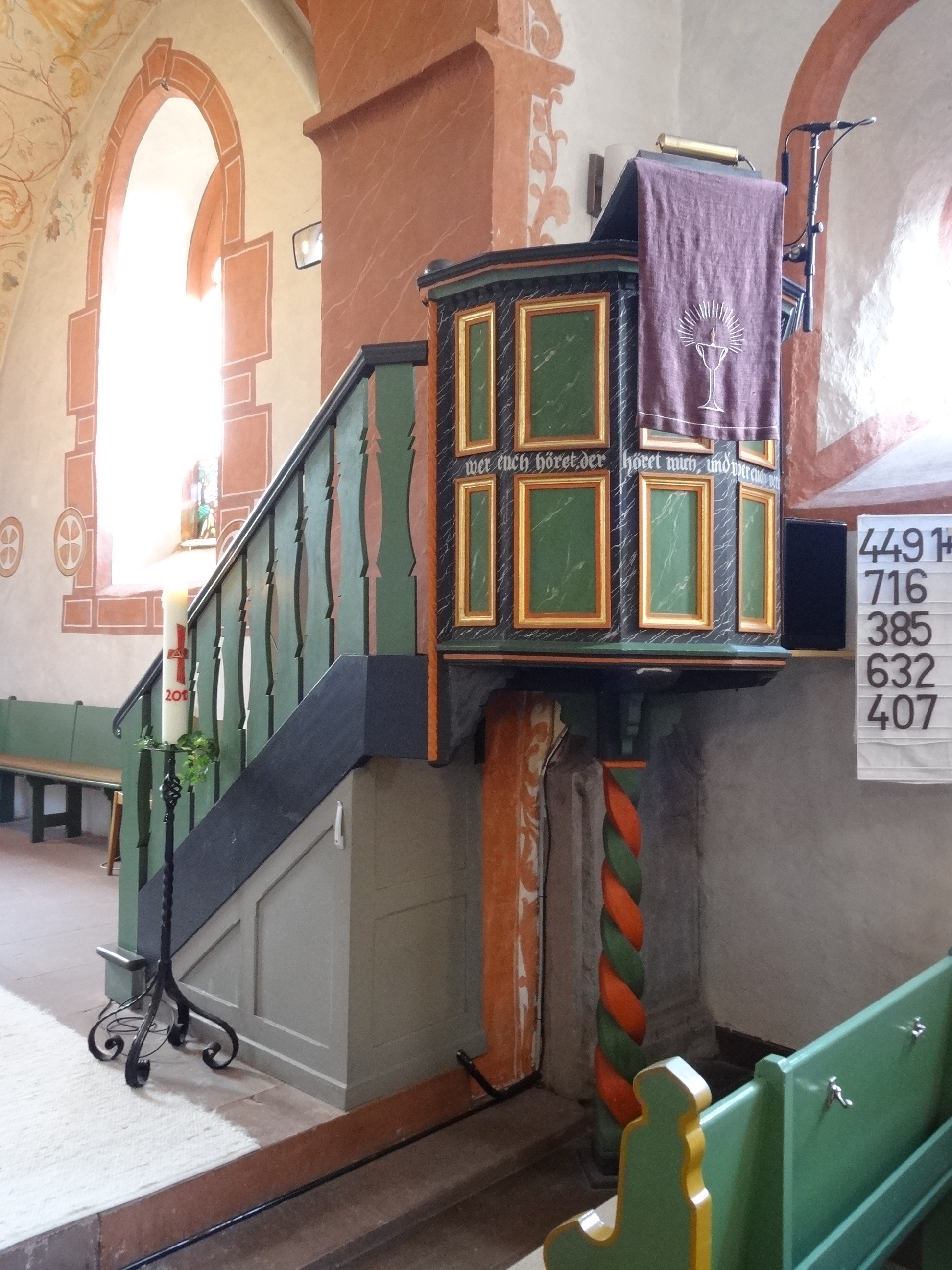 Evangelische Pfarrkirche Ober-Widdersheim